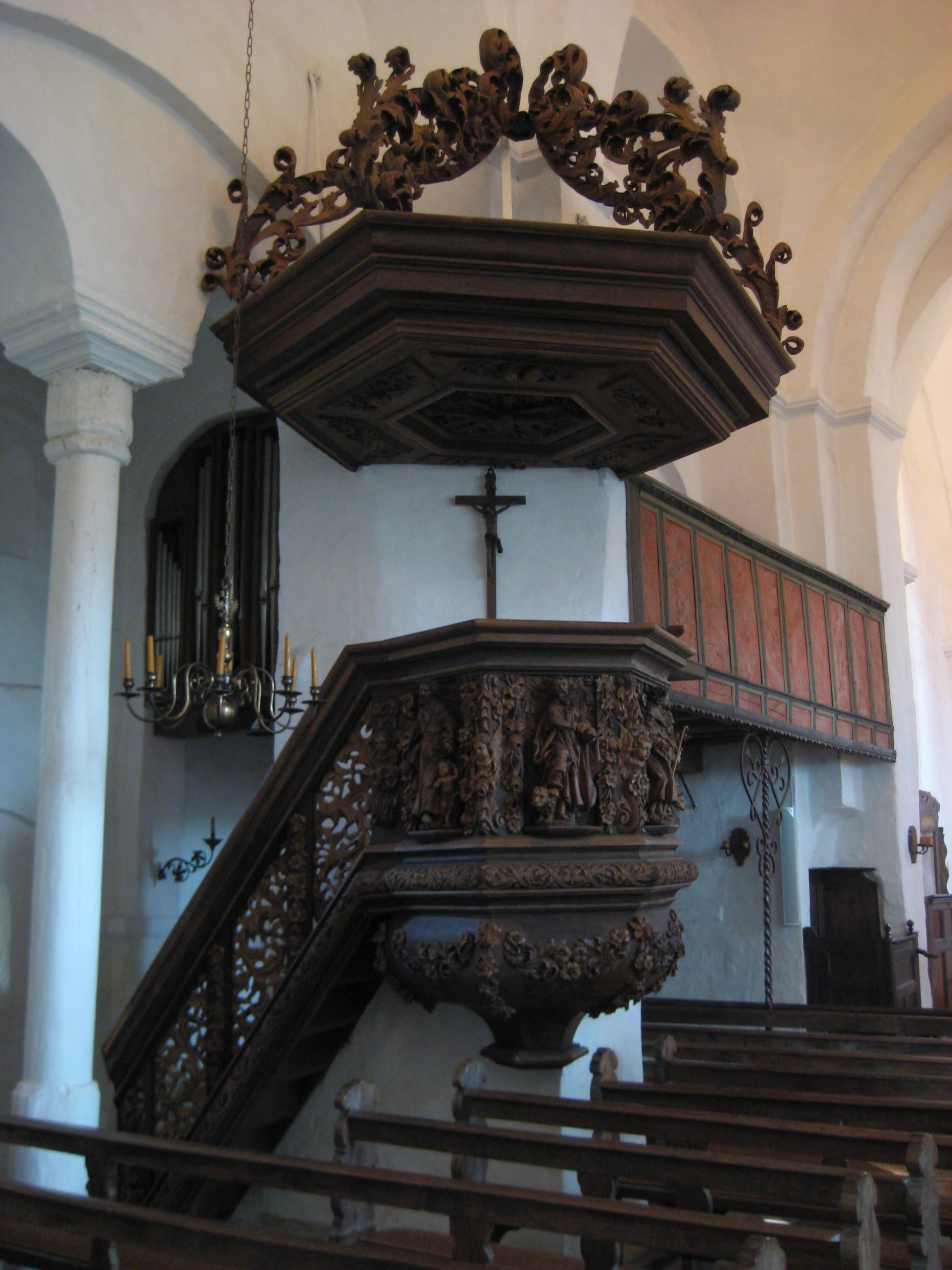 Barocke Kanzel, Alte St. Alexanderkirche in Wallenhorst, ursprünglich in der Kirche des Osnabrücker Dominikanerklosters